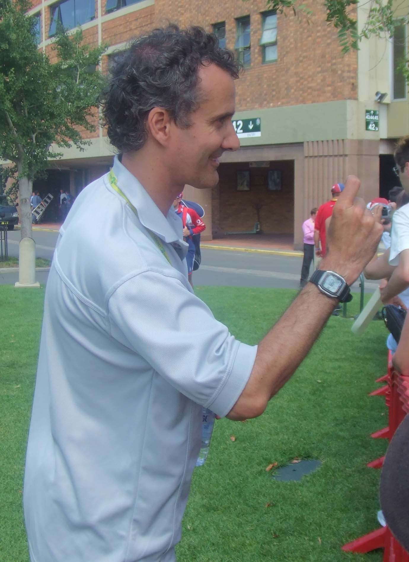 Brent Bowden